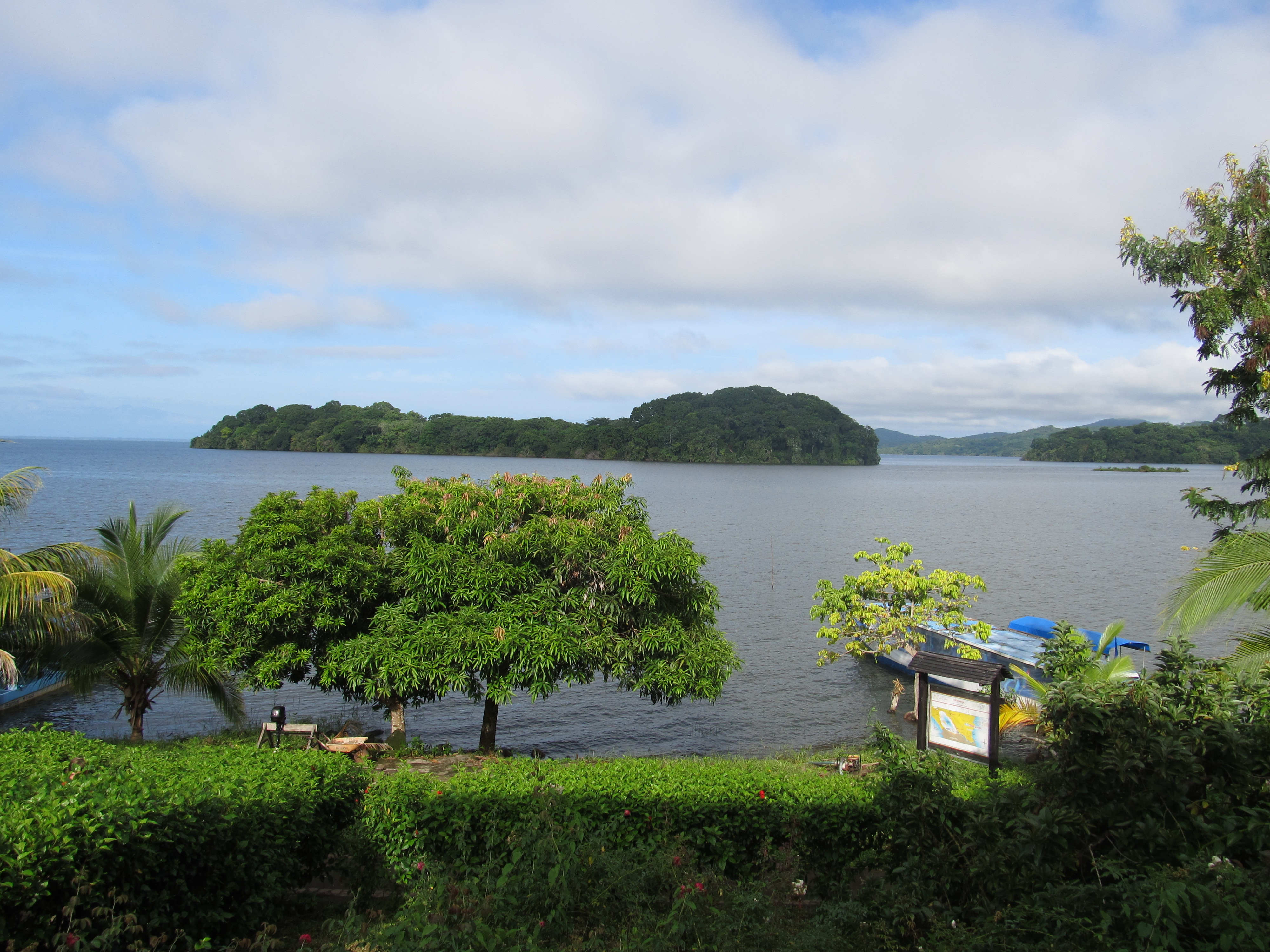 Blick auf den Nicaraguasee bei Mancarrón einer Insel des Archipel Solentiname.